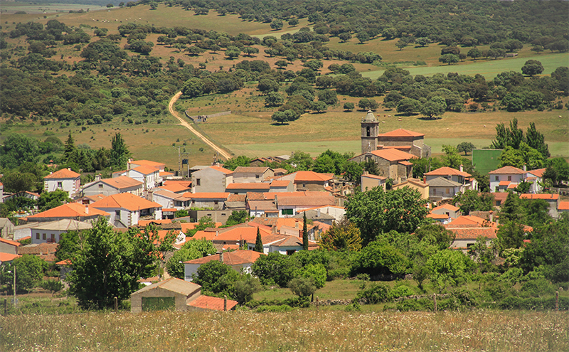 Vista del pueblo de Aldea del Obispo, en la provincia de Salamanca